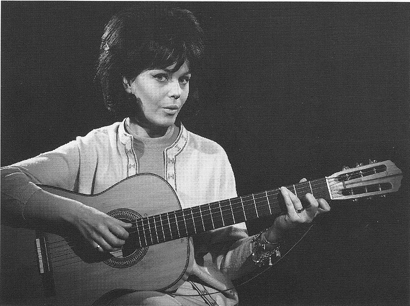 گیلکی: Gitarrspelande